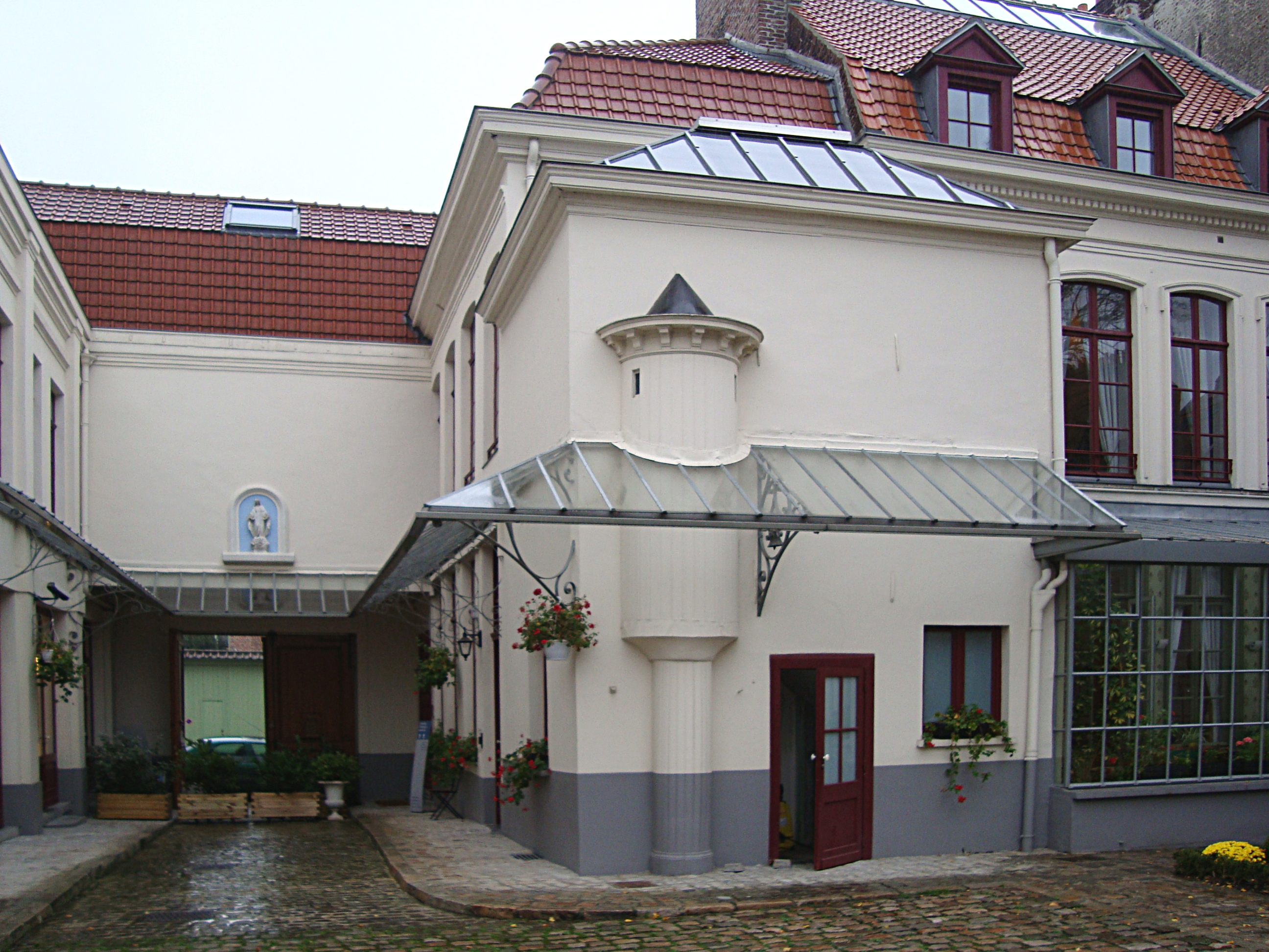 La maison natale de Charles de Gaulle à Lille (Nord).